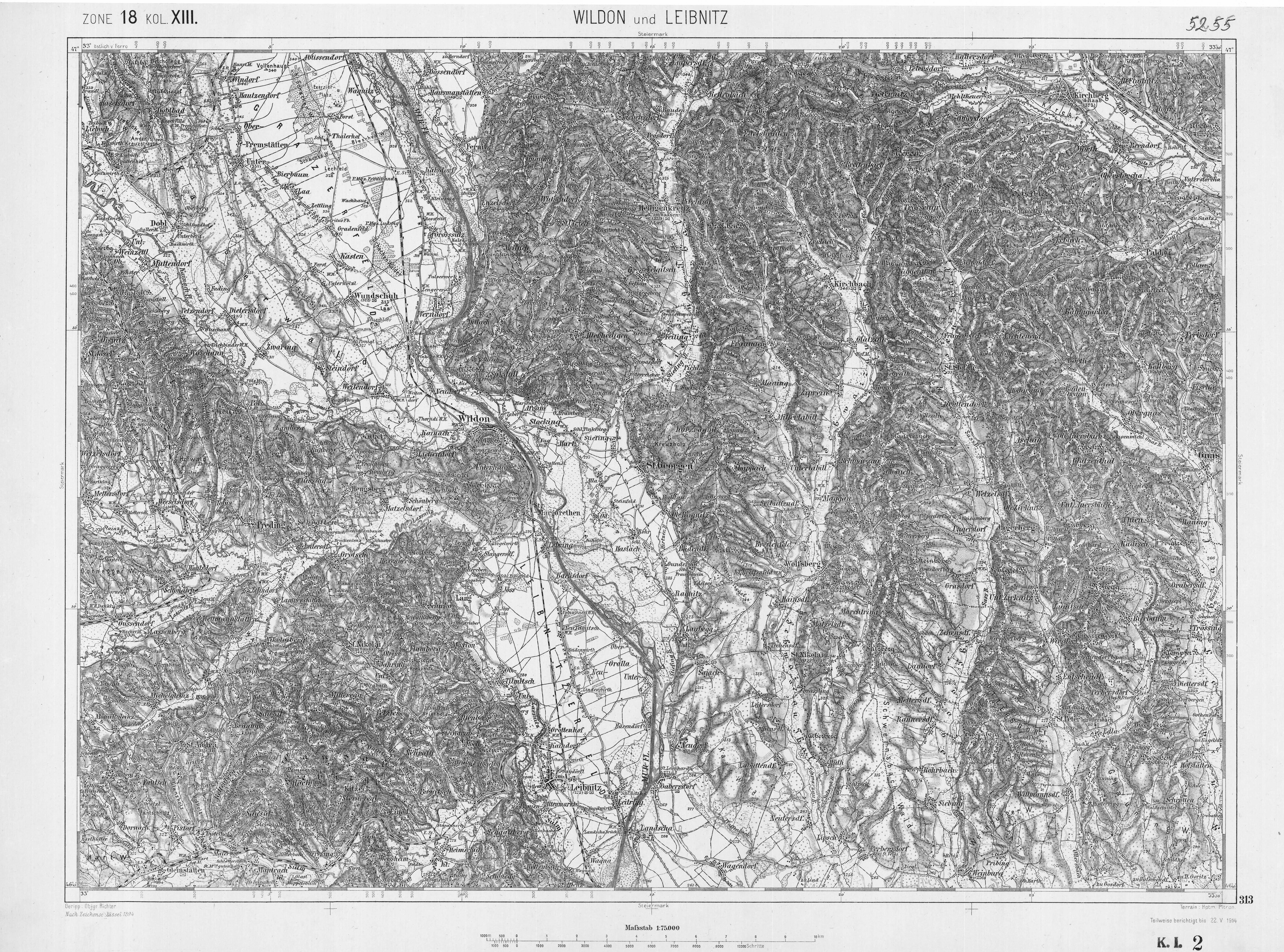 historische Landkarte: franzisco-josephinische (3.) Landesaufnahme der österreichisch-ungarischen Monarchie. Blatt Wildon und Leibnitz, Steiermark, Österreich. Nr. 5255. Zone 18 Kolumne XIII.